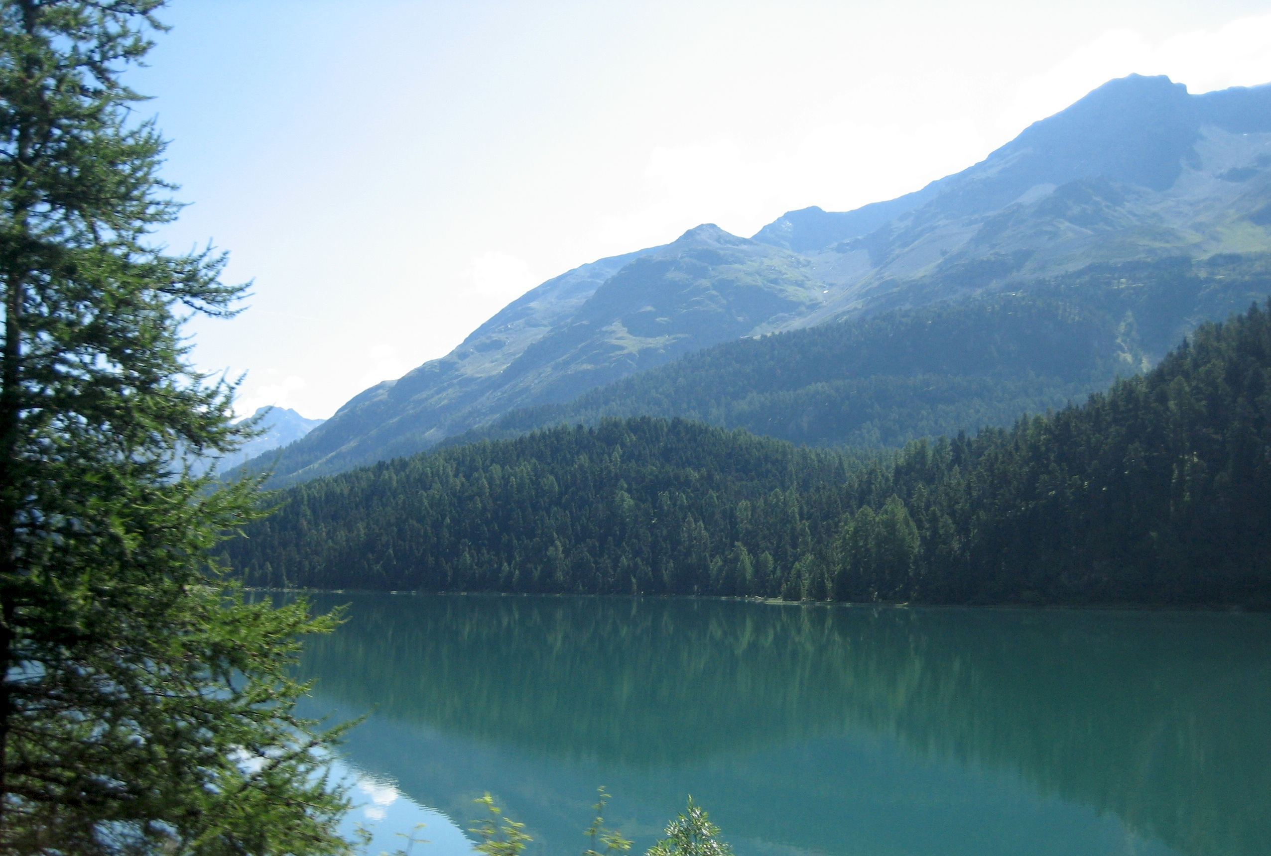 Champfèrersee